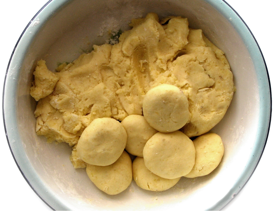 kluski śląskie w trakcie formowania